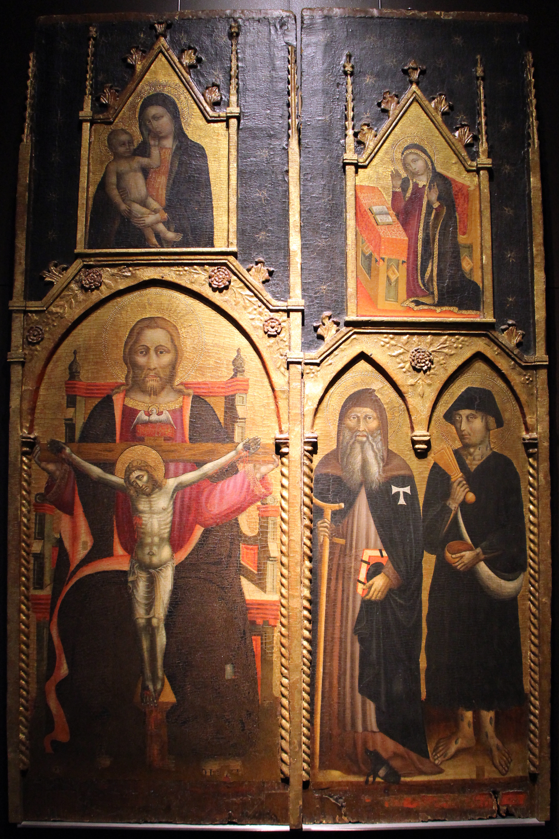 Museo Diocesano (Genoa) The making of this document was supported by Wikimedia CH. (Submit your project!) For all the files concerned, please see the category Supported by Wikimedia CH.